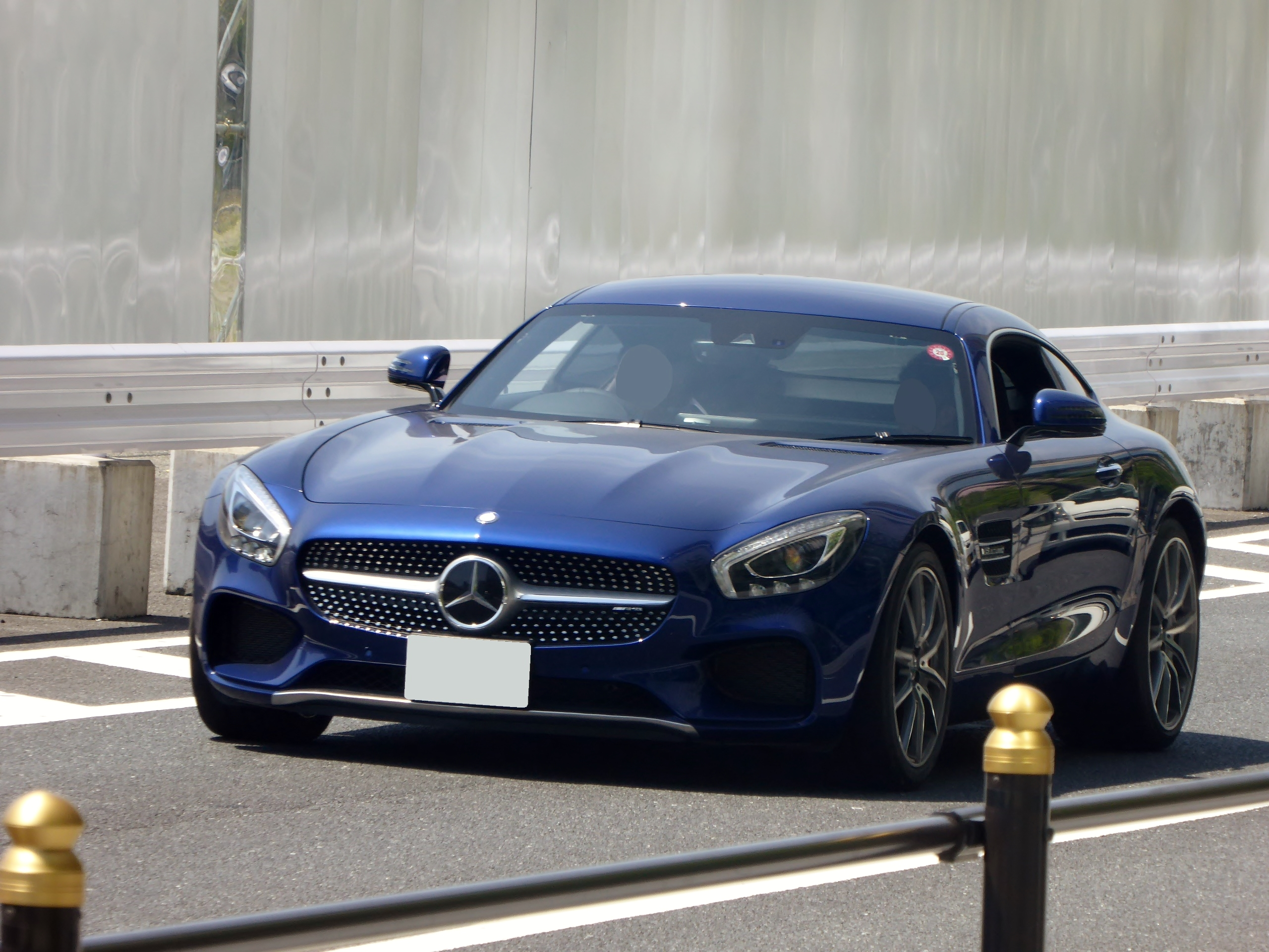 青いC190型メルセデス・AMG GT Sをフロントから撮影。